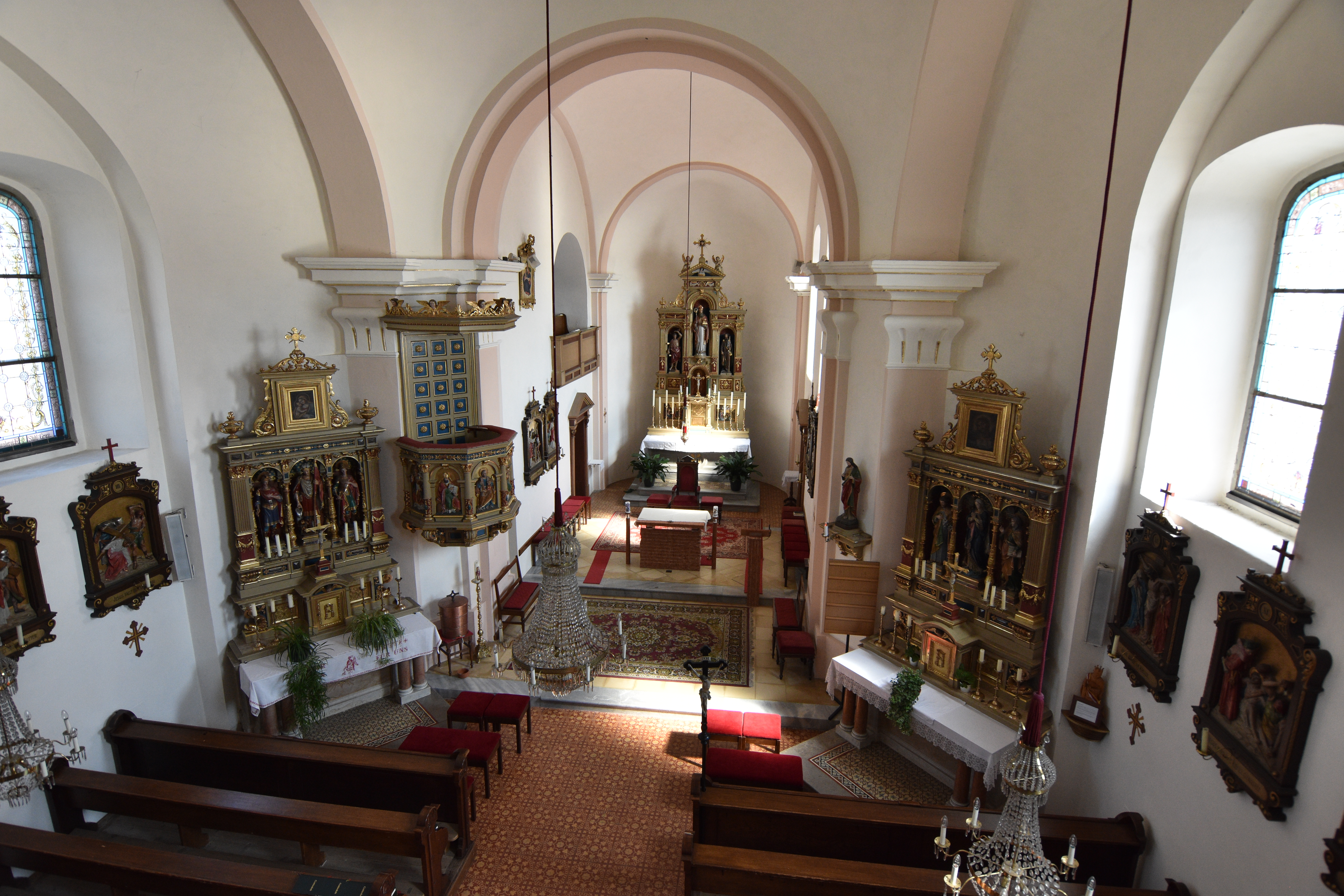 Kirche Nikolaus von Myra Sankt Nikolai ob Draßling Interior